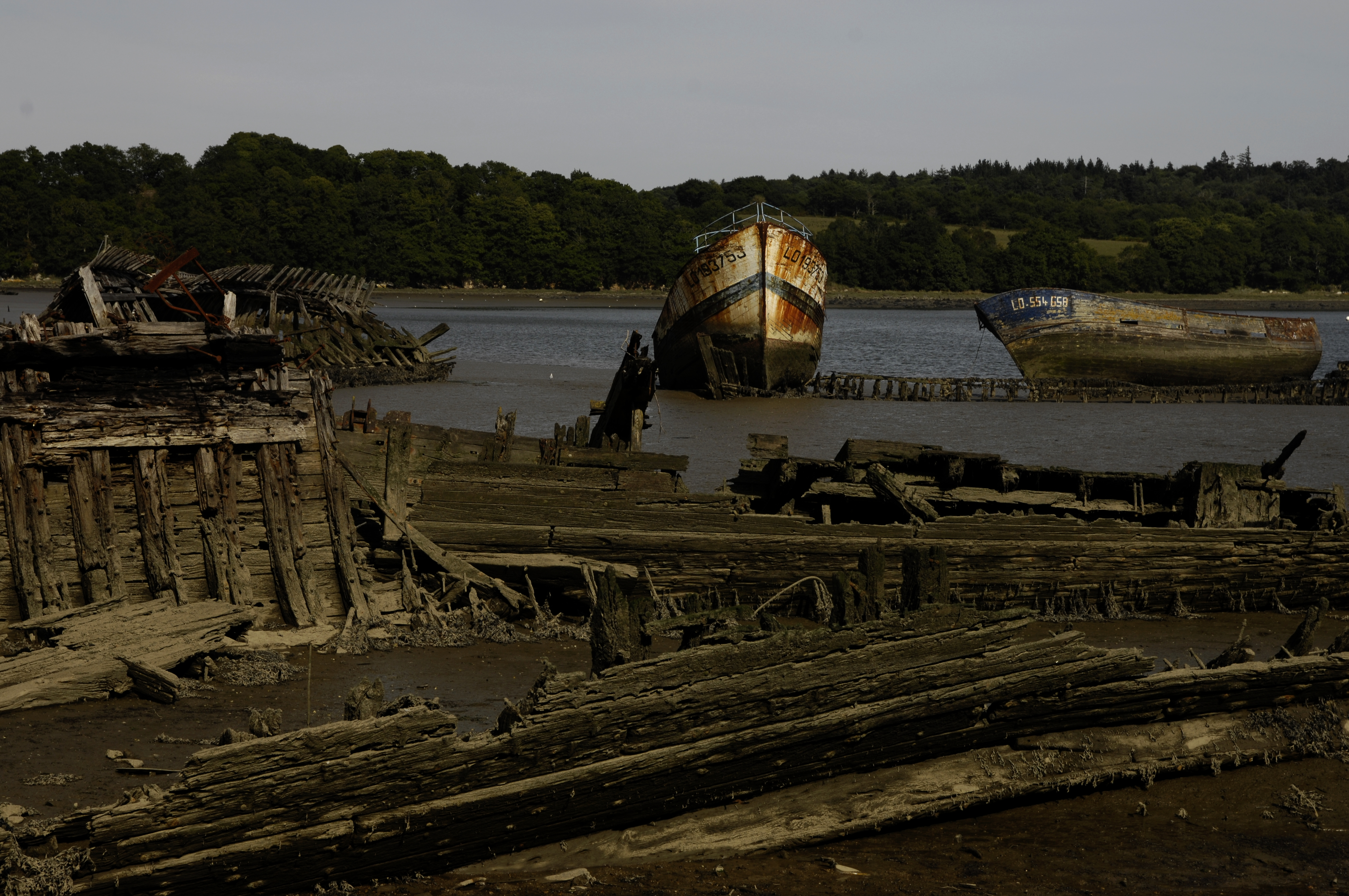 Cimetière de bateaux de Kerhervy sur le Blavet, Lanester, Morbihan, Bretagne